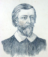 O poeta Gregório de Matos por F. Briguiet.